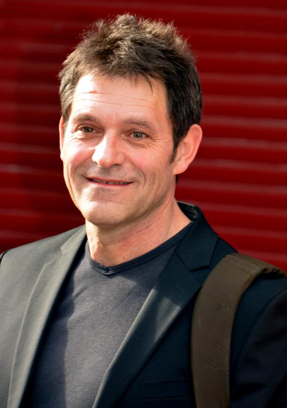 Patrick Catalifo à la cérémonie des Molières